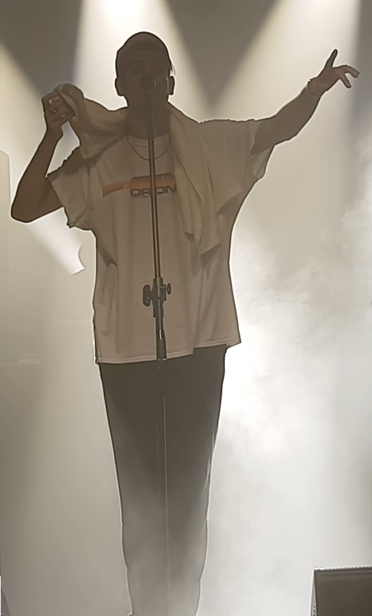 Taco Hemingway podczas koncertu we Wrocławiu, 2017